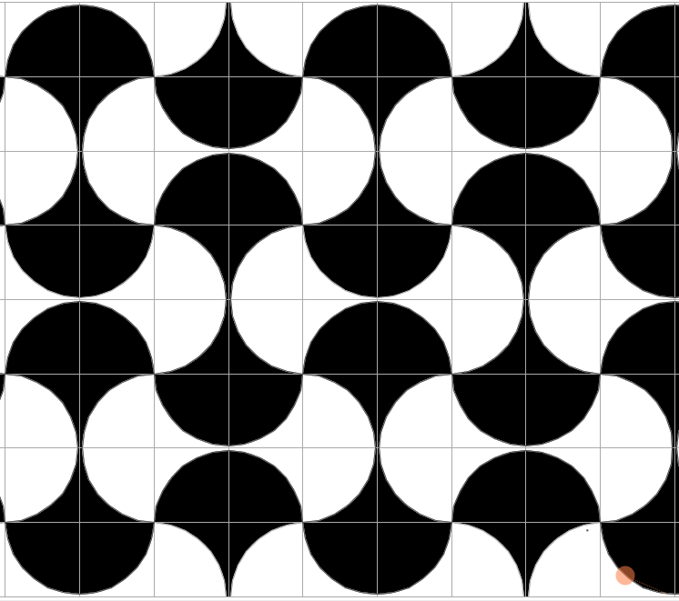 Sanefa del terra de la Plaça de la Vila de Vilanova i la Geltrú representada en Geogebra a color